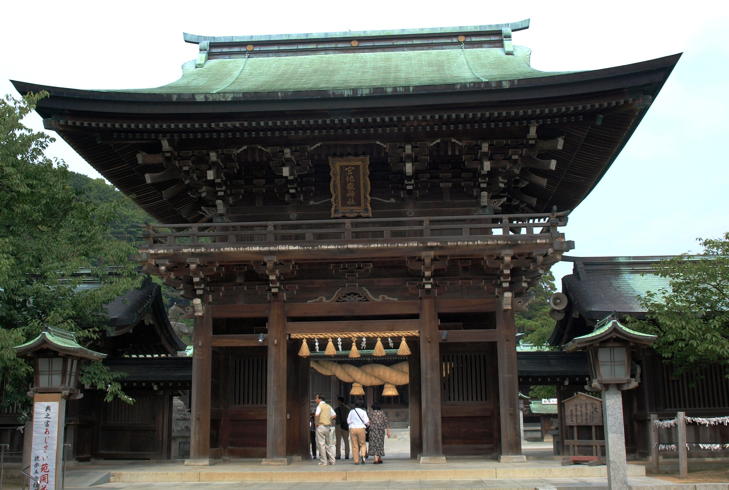 福岡県福津市の宮地岳神社の楼門。